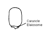 Elaiosom, Caruncula / elaiosome, caruncle